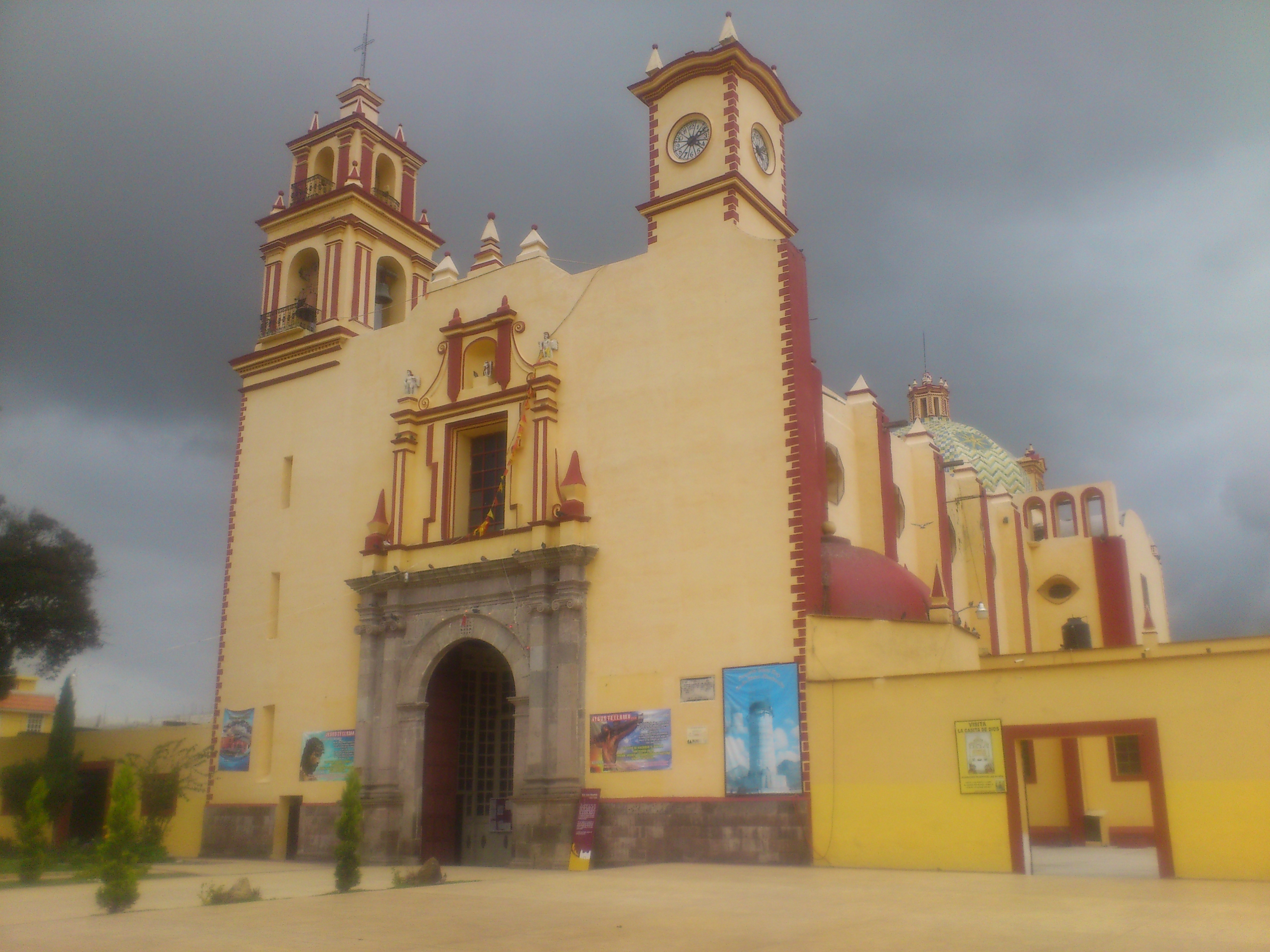 Fachada del Templo de San Juan Bautista